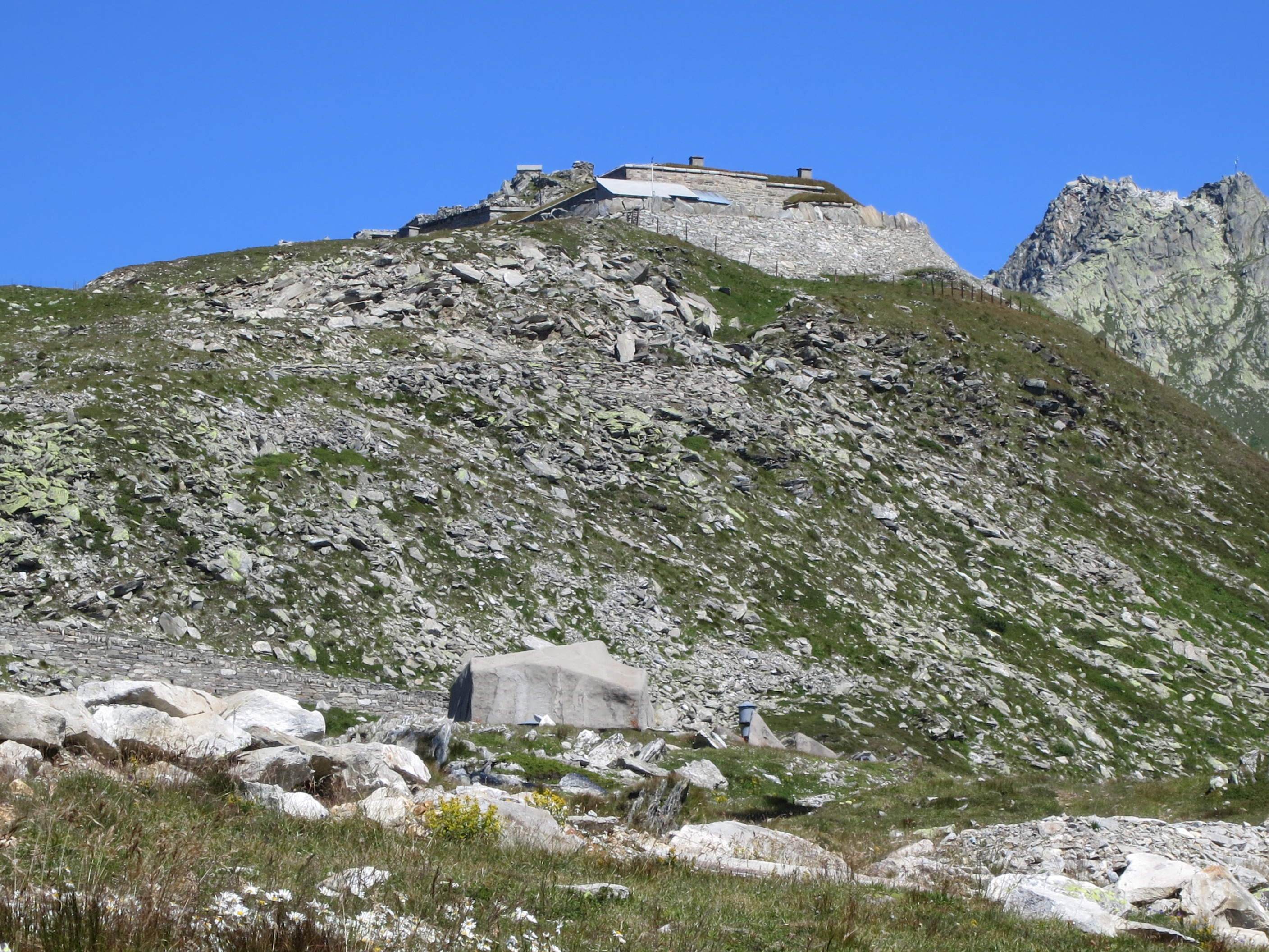 Fort Stöckli, Andermatt UR, Schweiz